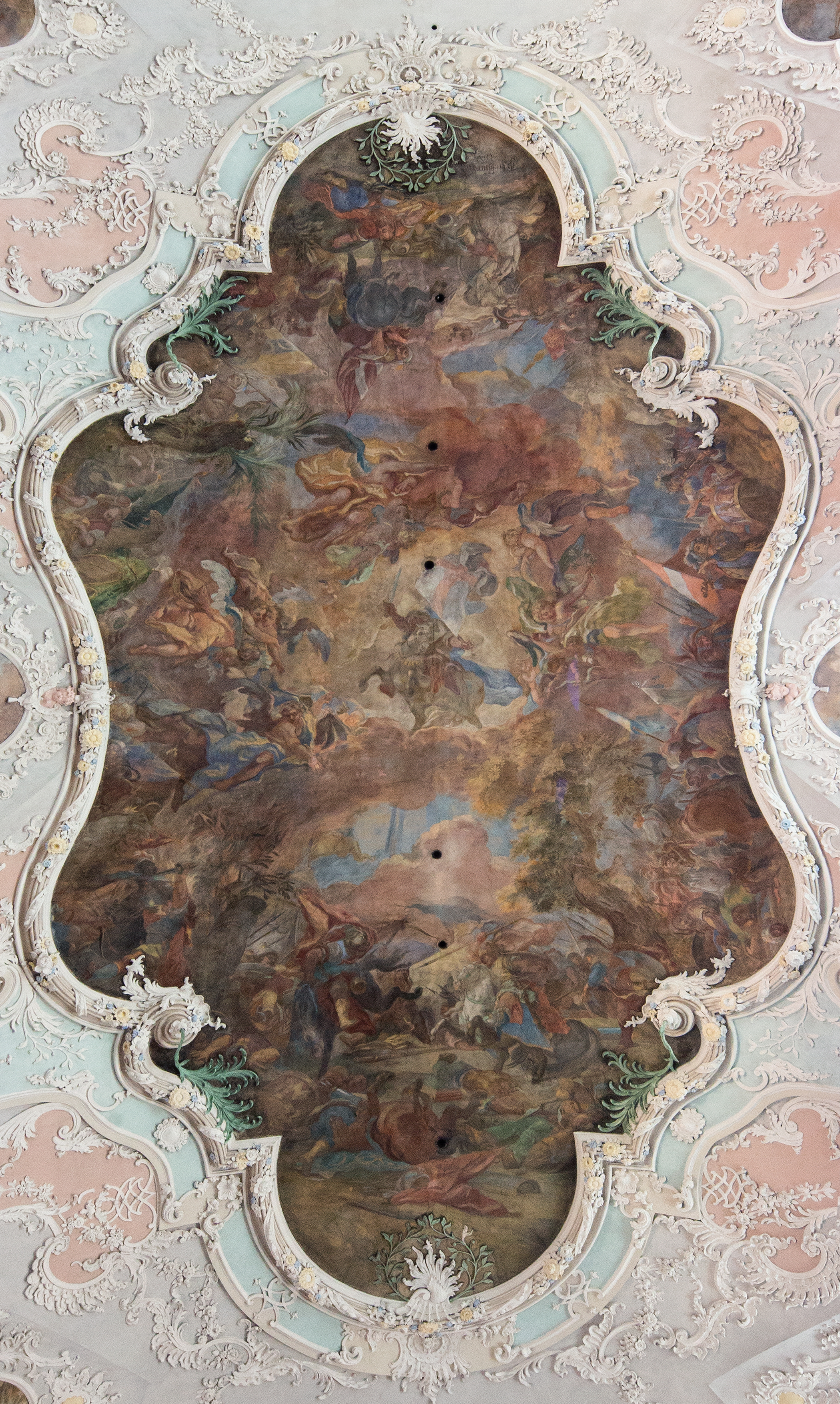 Stadtpfarrkirche St. Jakobus, Cham: Deckenfresko von Johann und Otto Gebhard, "Die Schlacht von Clavijo", in der der heilige Jakobus dem asturischen König Ramiro I. erscheint und ihm seinen Beistand bei dem bevorstehenden Kampf gegen die Mauren verspricht.